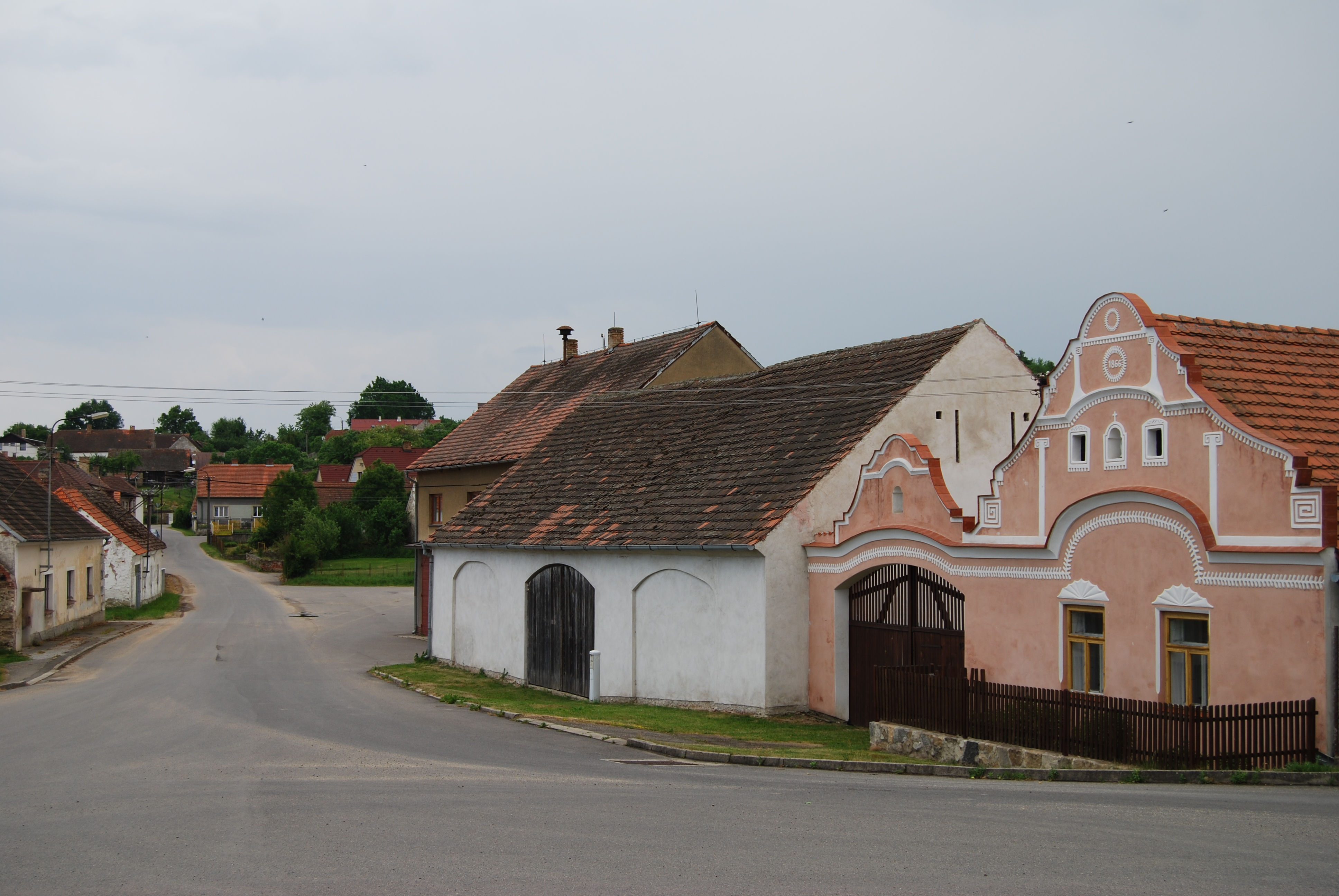 Usedlost v obci. Kluky. Okres Písek. Česká republika.